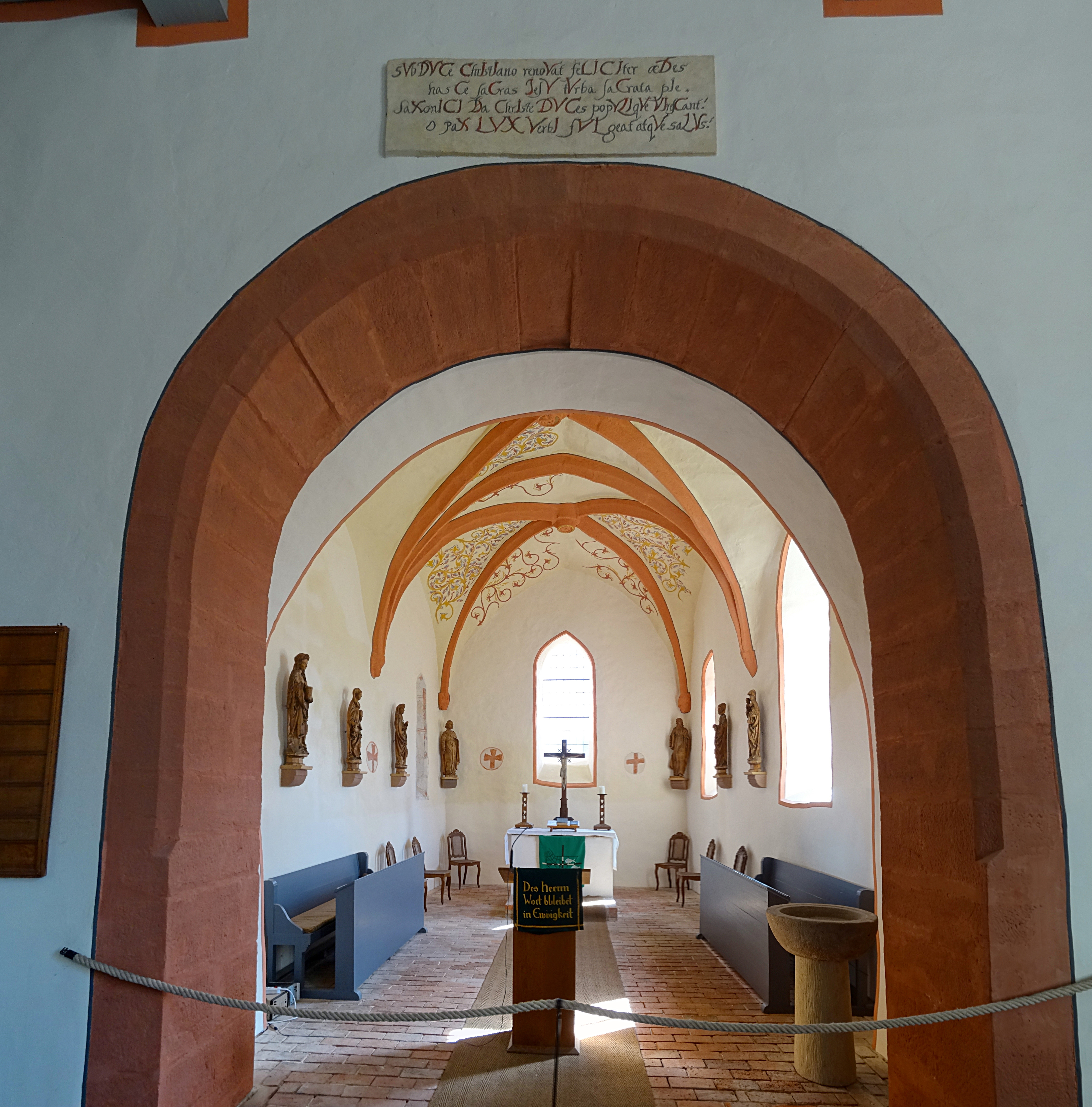 Chor der Heilig-Kreuz-Kirche Stadtroda